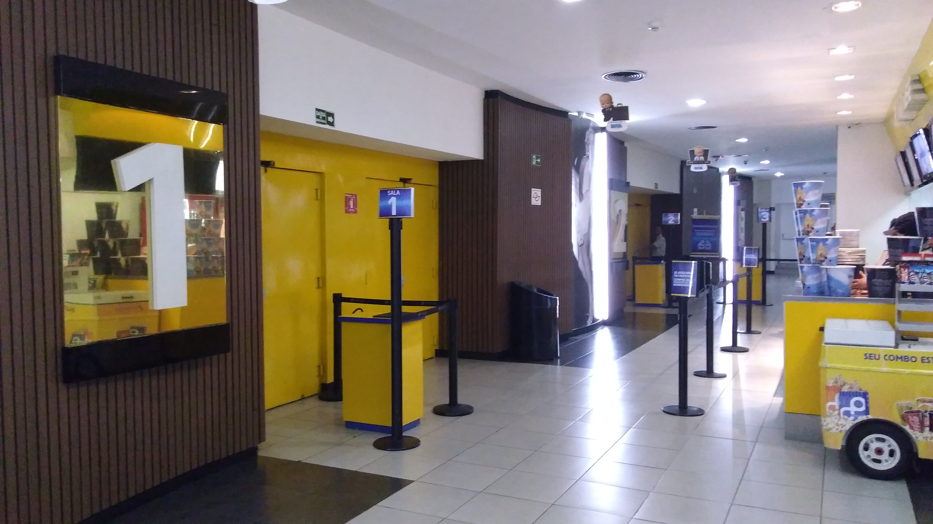 Foyer e acesso à Sala 1 do Centerplex Lapa de São Paulo, SP